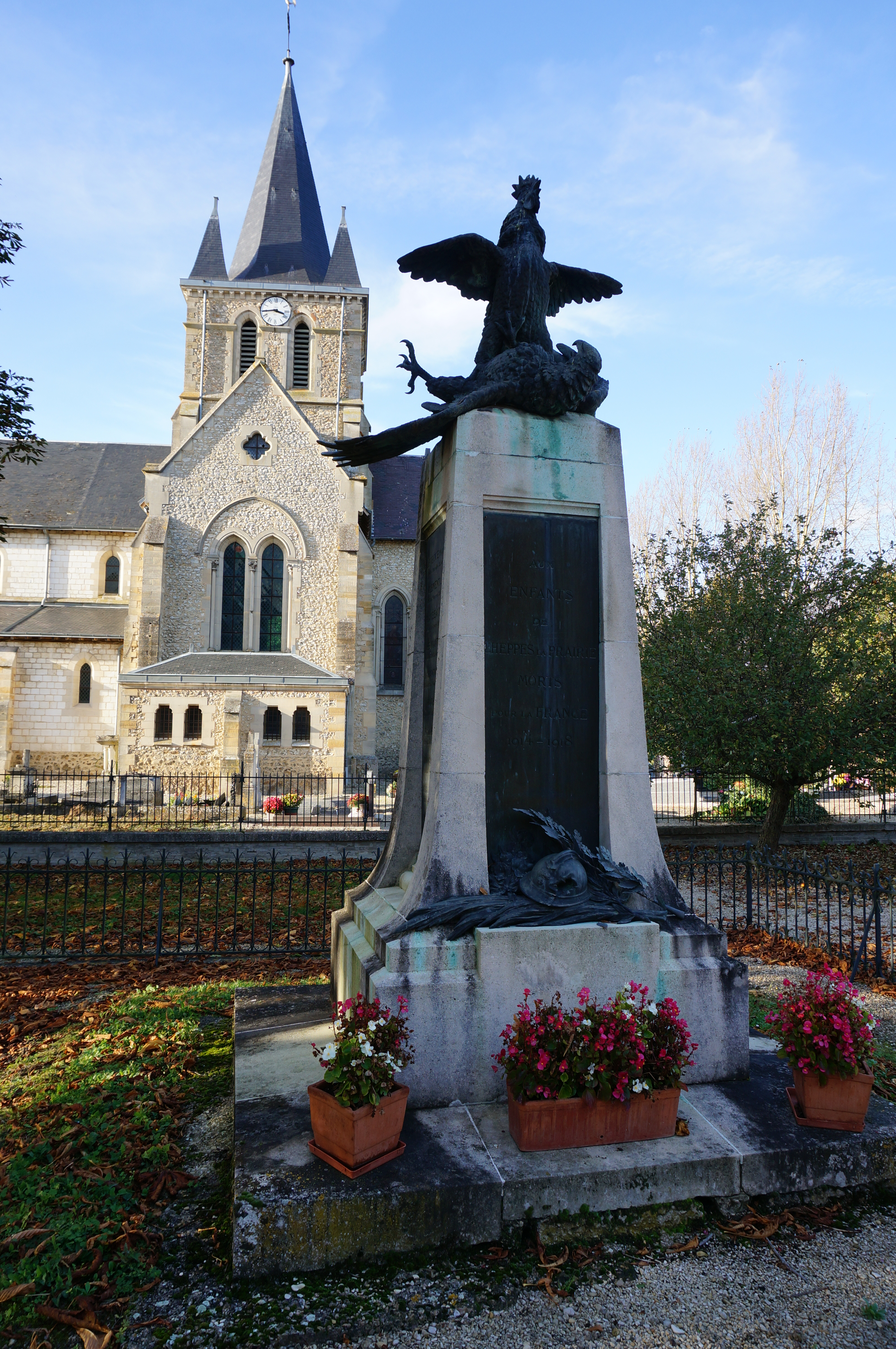 Vue del'église et du monument aux morts le Coq triomphant de l'Aigle . .